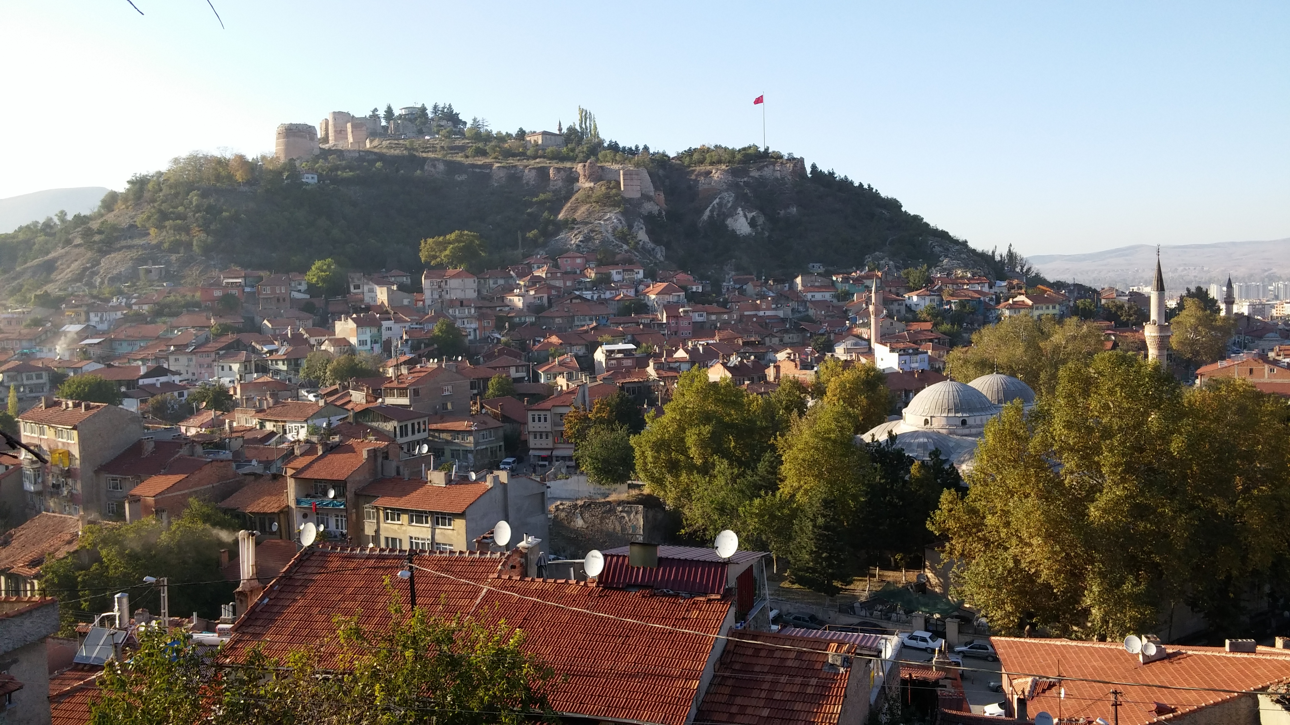 Kütahya Kalesi